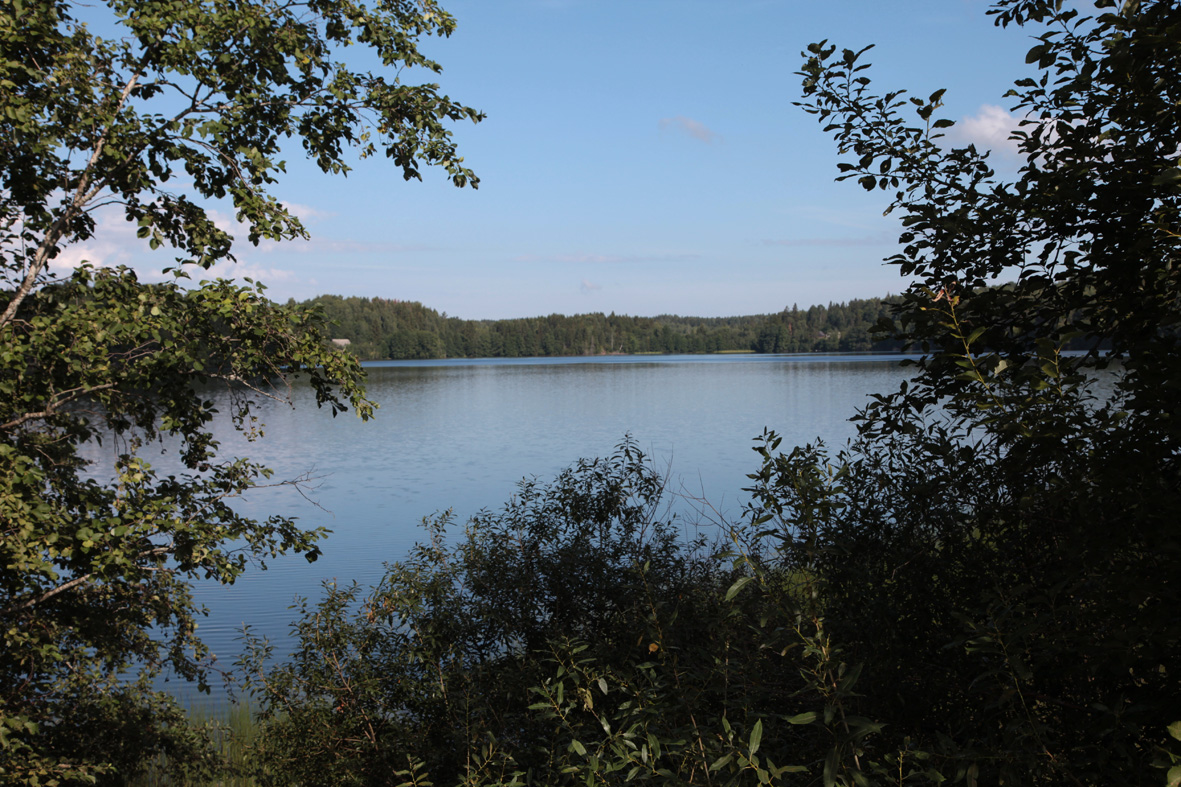 Глубокое озеро, Опочецкий район Псковской области.